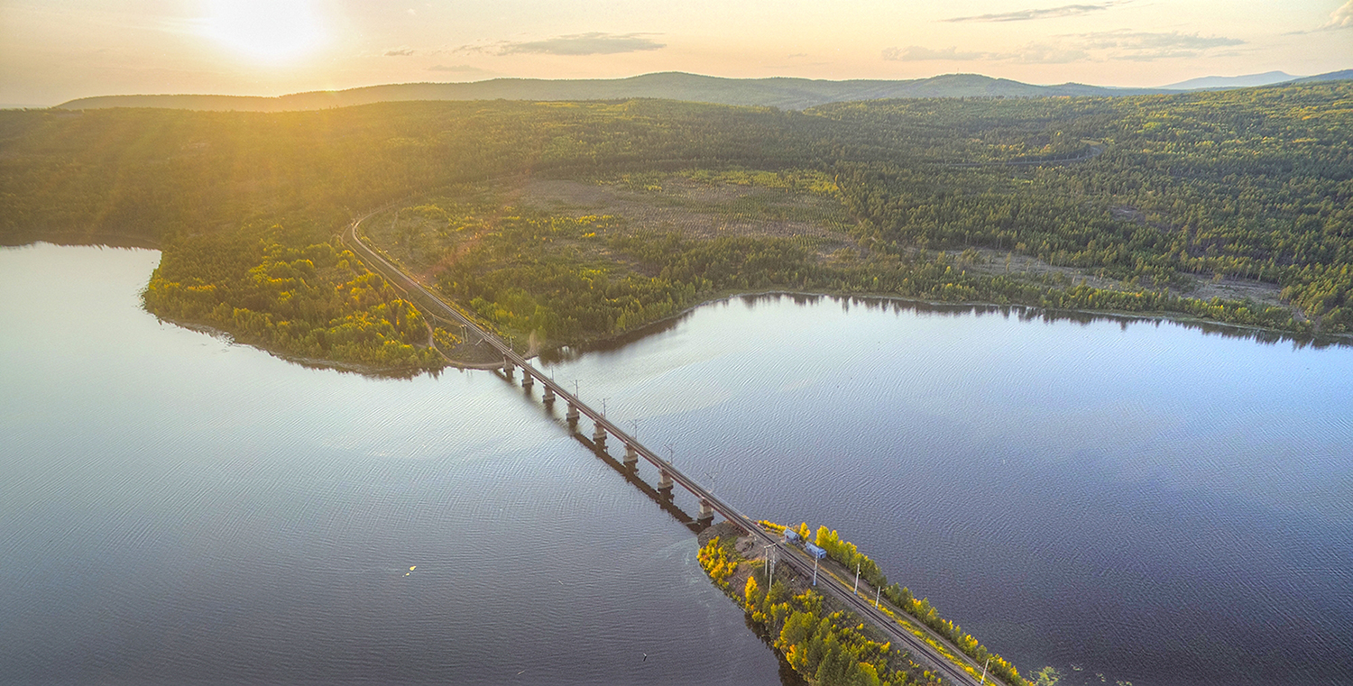 ЖД мост